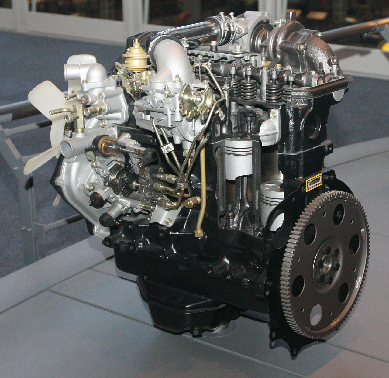 1982 Toyota 2L-TE Type engine. L4 2,446cc.